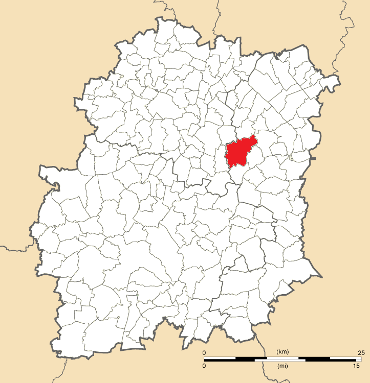 Carte de position de Vert-le-Grand en Essonne (91)